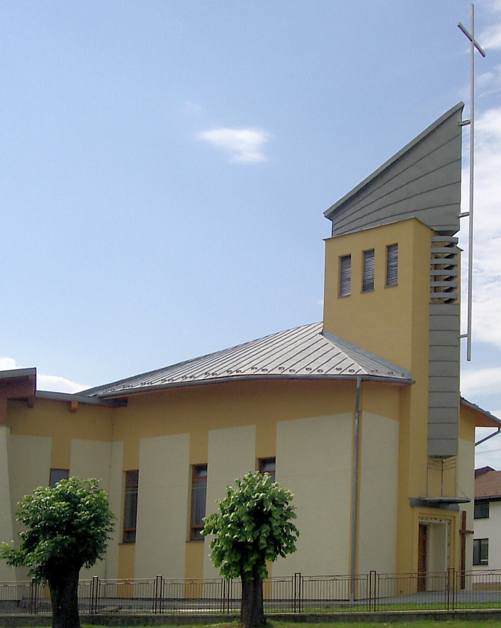 Rímskokatolícky kostol Sedliská